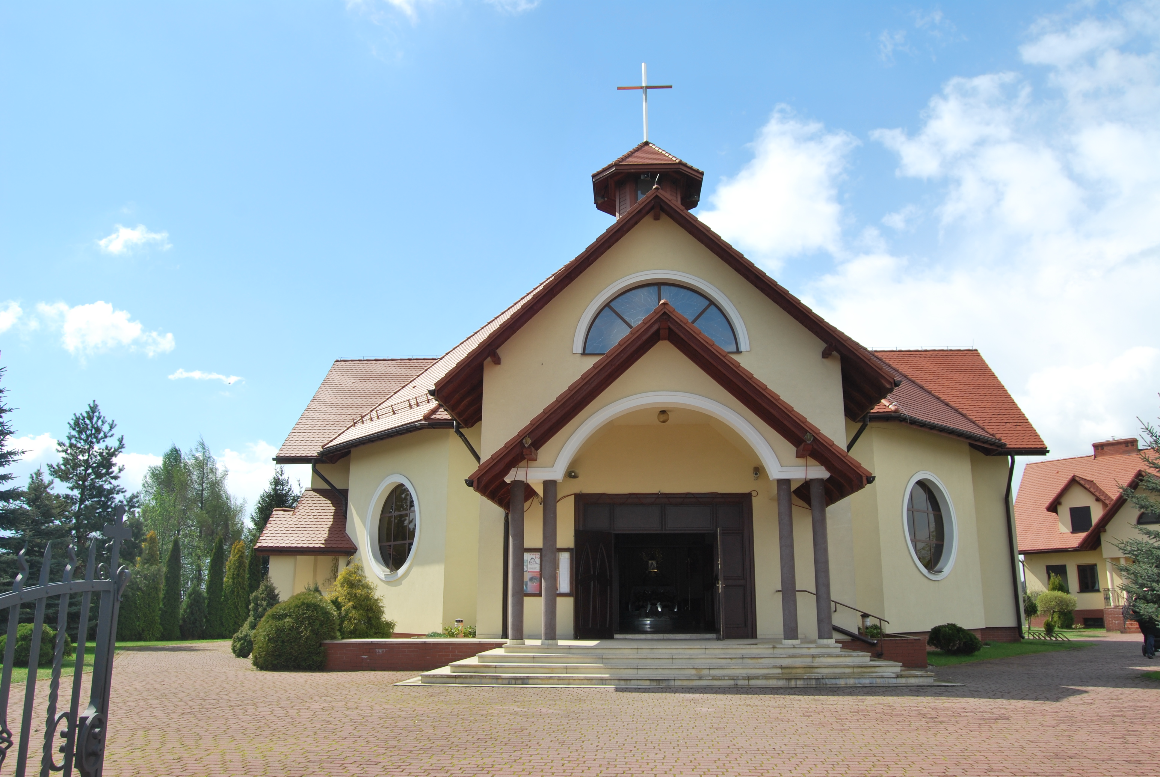 Kościoł parafialny pod wezwaniem św. Siostry Faustyny w Ostrężnicy